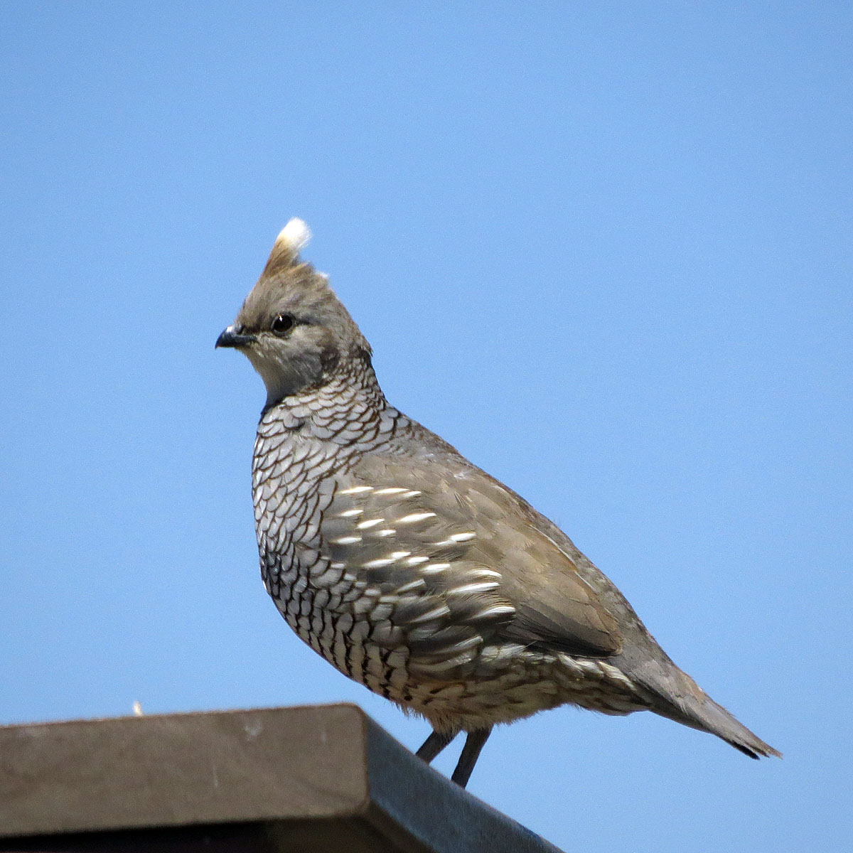 Callipepla squamata pallida 9 may 15 Cochise Lake, AZ